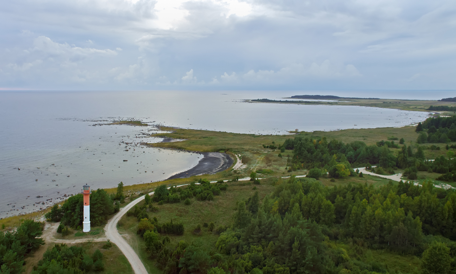 Sõru ülemine tuletorn, Hiiumaa rannik Hindu ja Tohvri külas